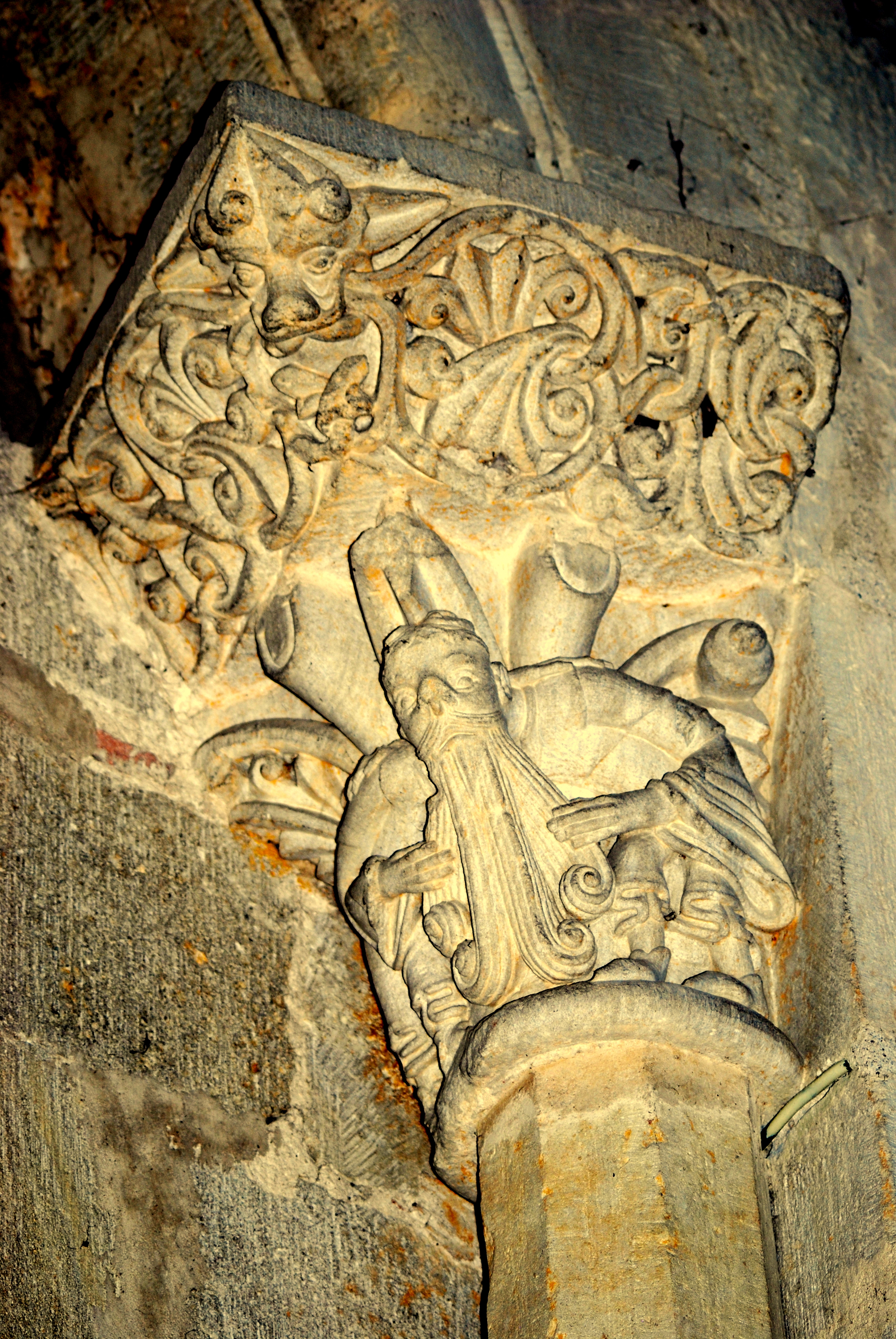 Chapiteaux de l'abbaye de Saint-Ferme